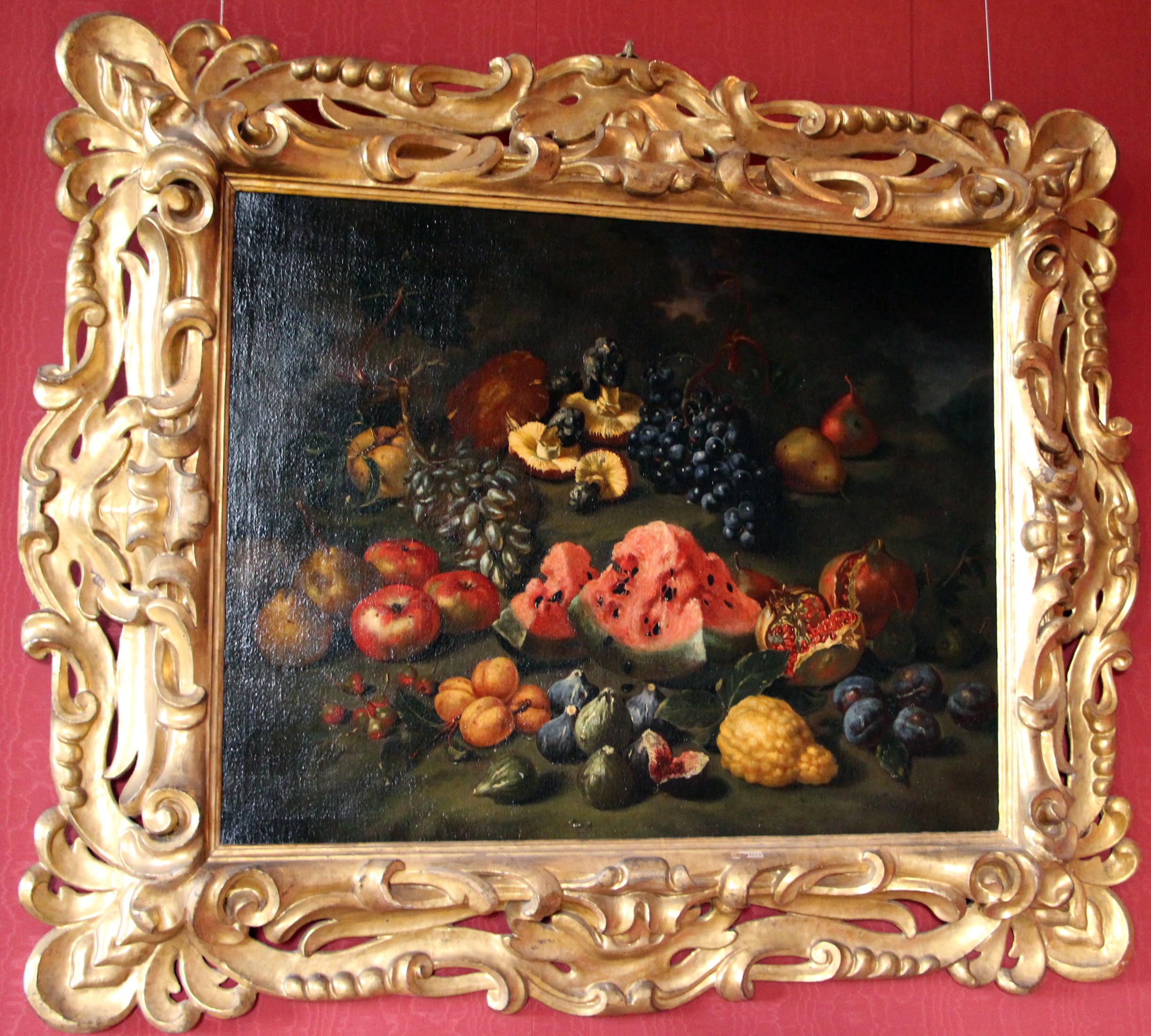 Villa medicea di Poggio a Caiano - MIBAC The making of this document was supported by Wikimedia CH. (Submit your project!) For all the files concerned, please see the category Supported by Wikimedia CH. This is a photo of a monument which is part of cultural heritage of Italy.